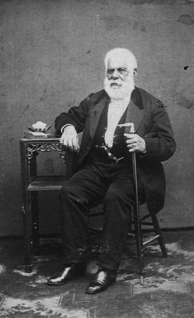 Pío Pico, last Mexican governor of Alta California